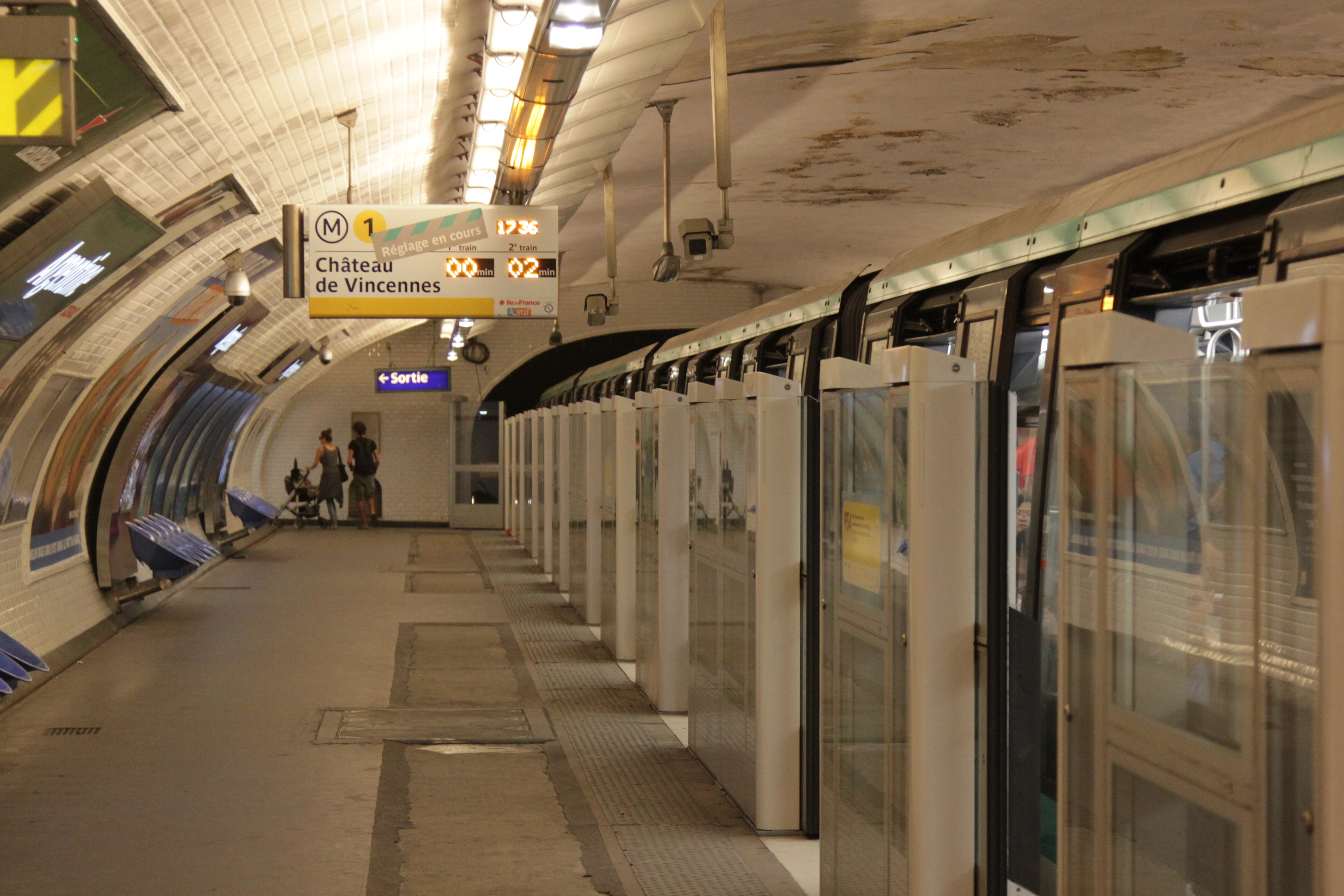 Station Argentine sur la ligne 1 du métro de Paris.